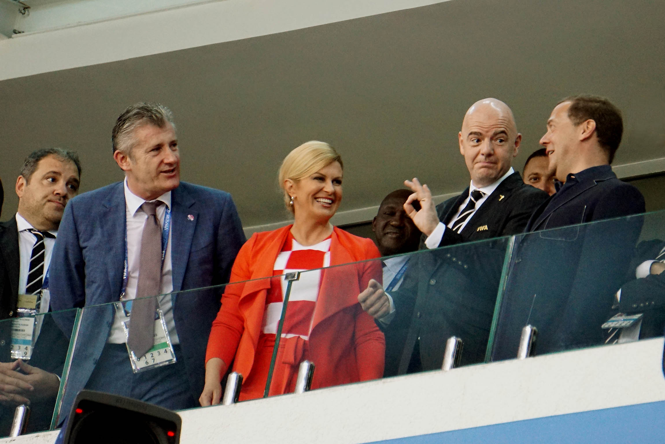 Глава правительства России Дмитрий Медведев, президент ФИФА Джанни Инфантино, президент Хорватии Колинда Грабар-Китарович.